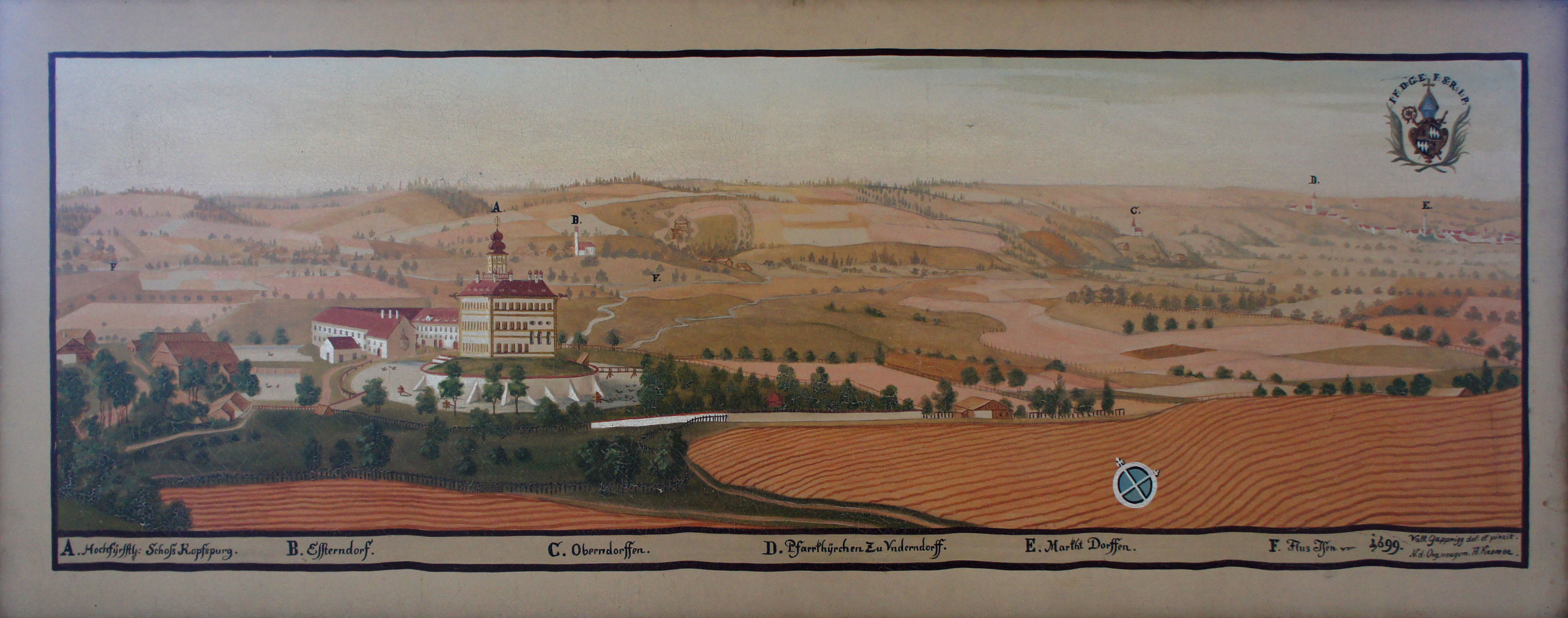 Gemälde aus einer Serie mit Darstellungen von Besitztümern des Hochstifts Freising im Fürstengang zwischen Fürstbischöflicher Residenz und Freisinger Dom.